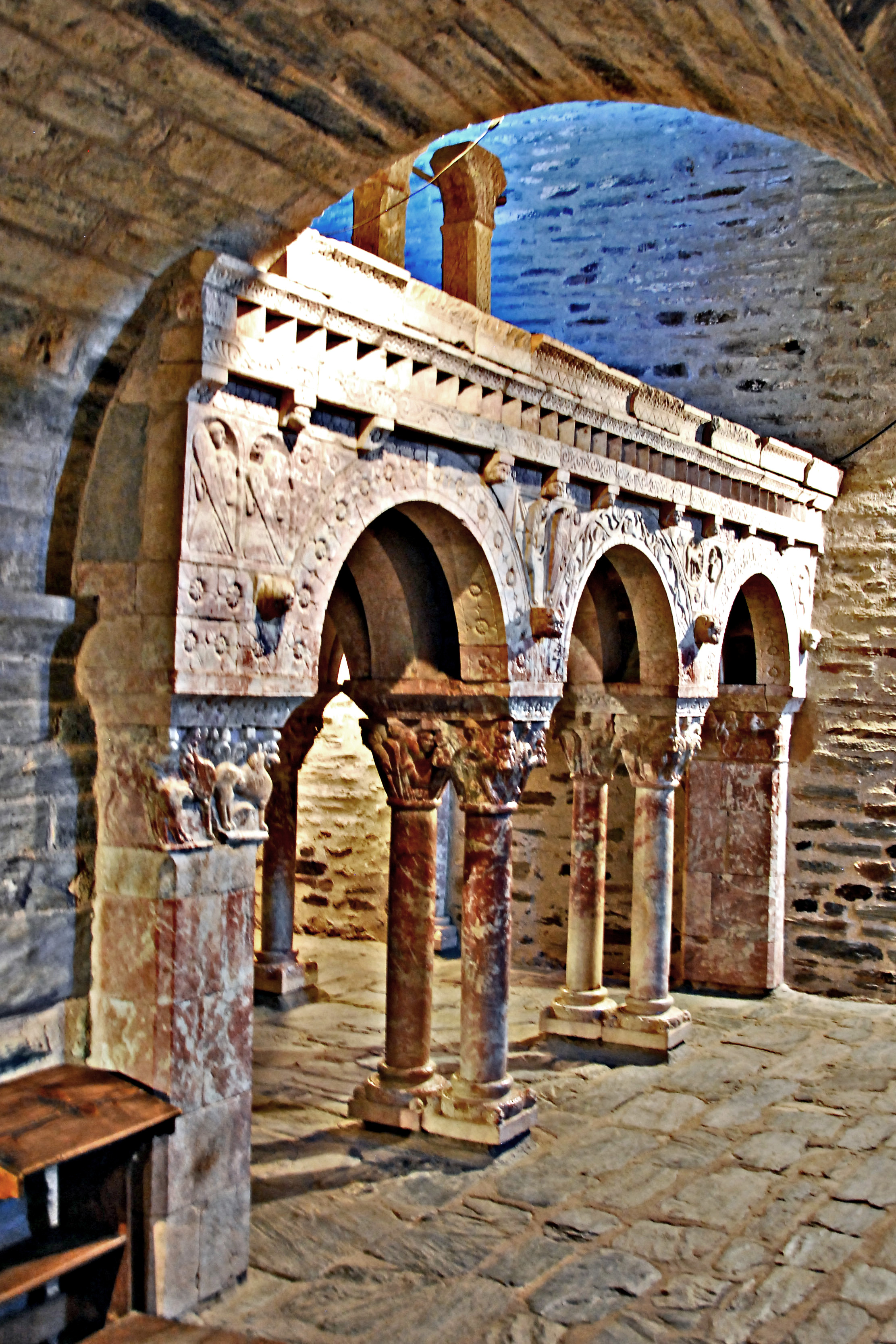 Serrabone, Empore, Westfassade, aus Seitenschiff